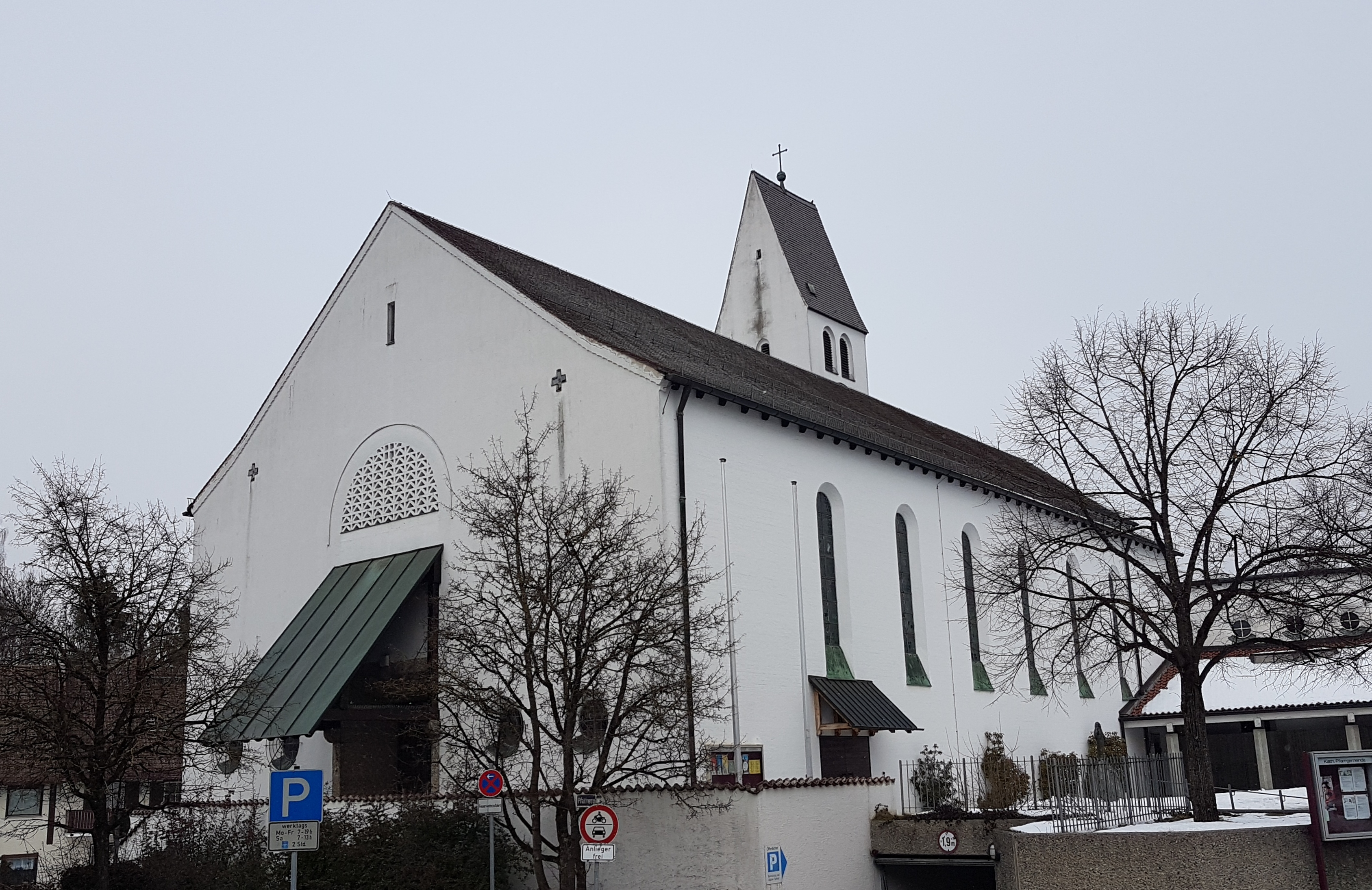 St. Benedikt (Gauting), Ansicht von Südwesten